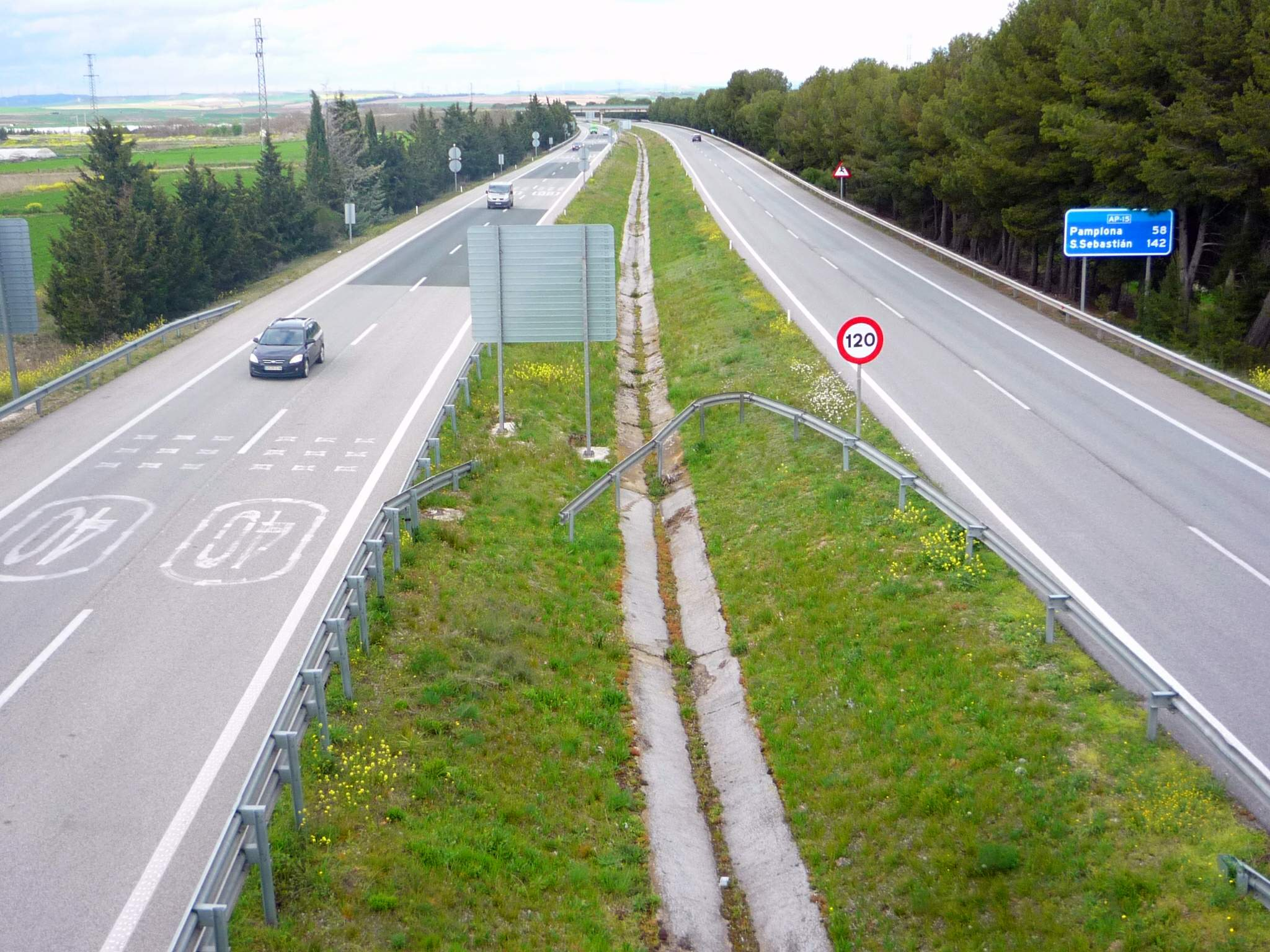 La Autopista AP-15 (Autopista de Navarra) a su paso por Marcilla